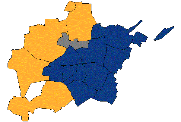 !Template:Llegenda}